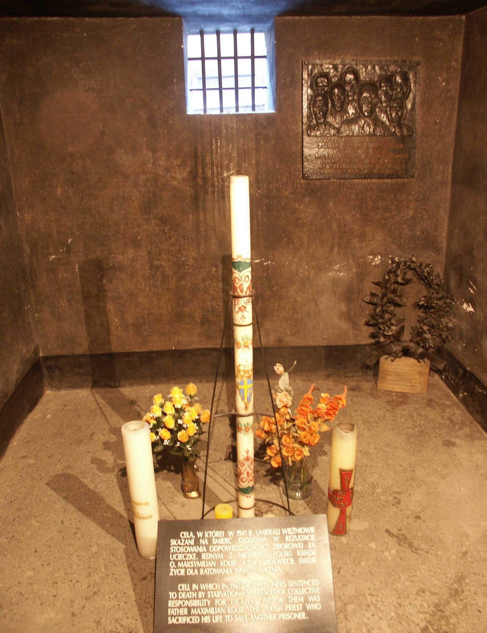 Todeszelle Pater Maximilian Kolbes, KZ Auschwitz I, Block 11